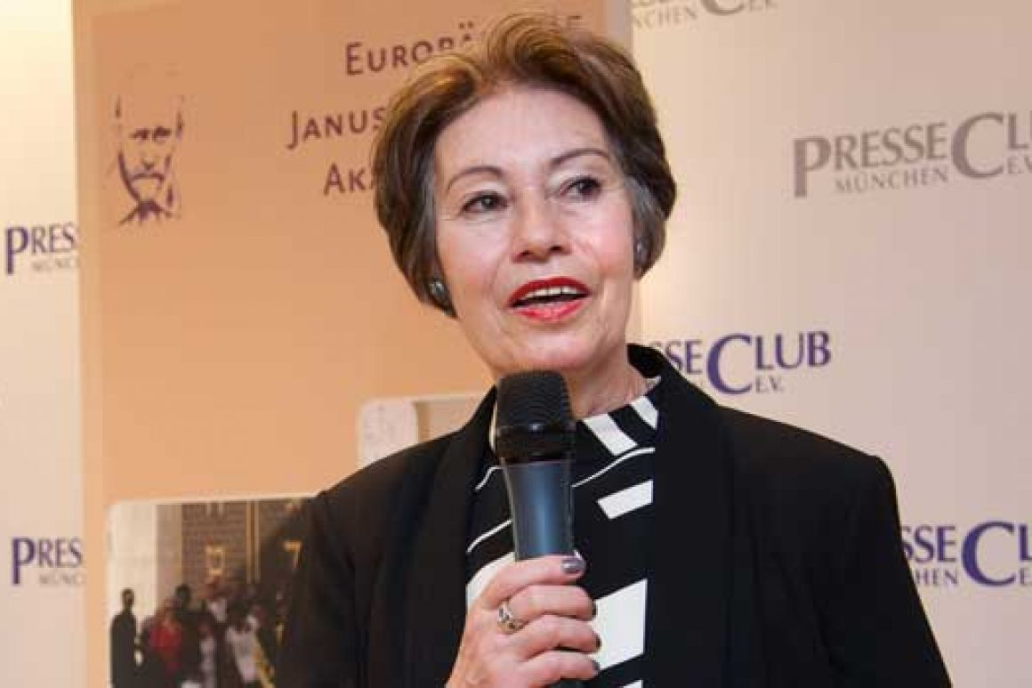 Eva Haller geb. Spoleanschi